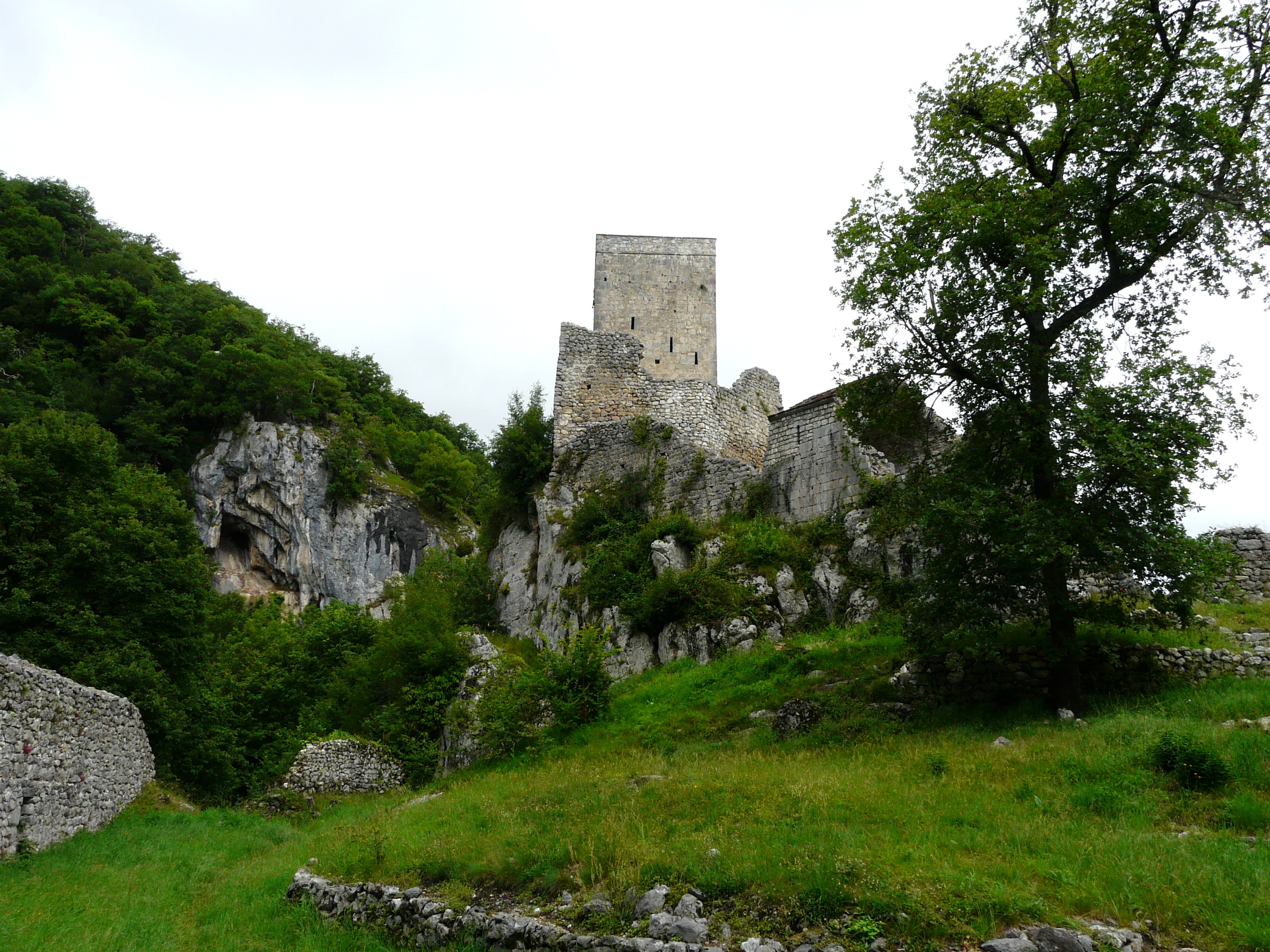 Les ruines du château des Comtes de Comminges, Bramevaque, Hautes-Pyrénées, France.